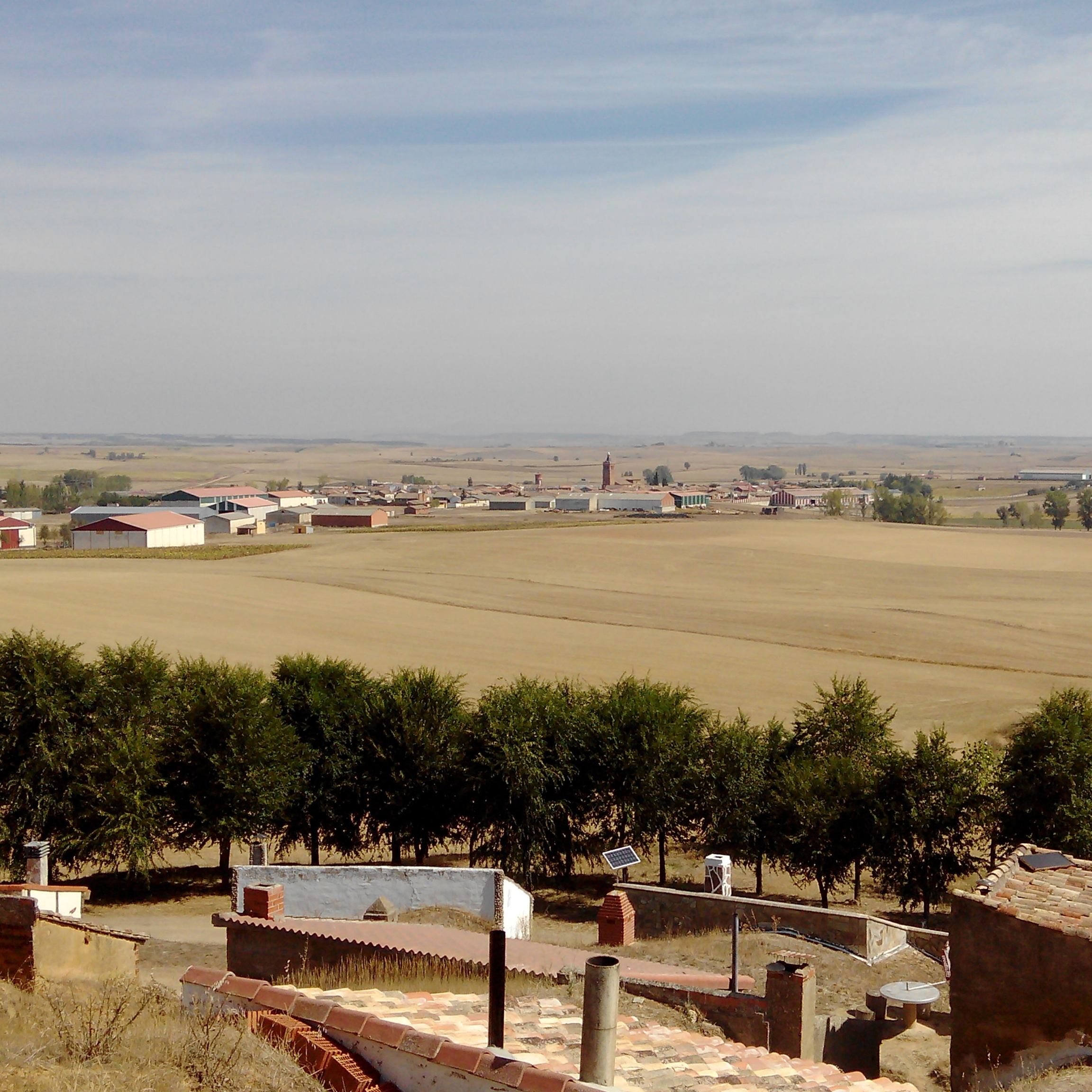 Vista del municipio de Villaherreros desde las bodegas de San Pedro